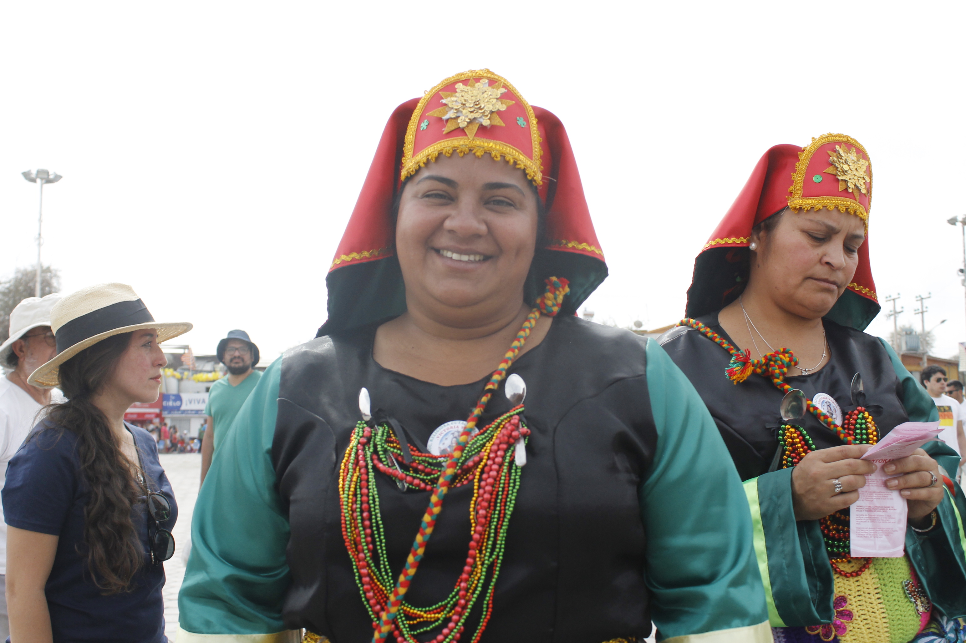 cuyacas de Victoria Vernal traje de gala